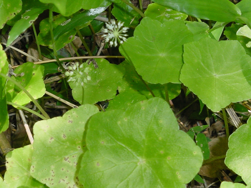 Hydrocotyle ranunculoides - APIACEAE Imbituba - SC - Brasil